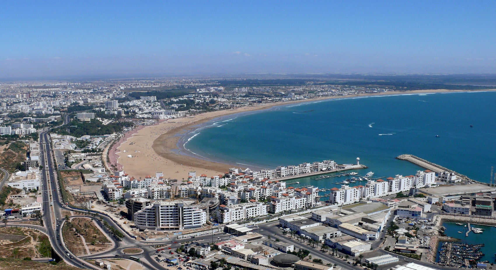 La città di Agadir ricostruita, foto fatta nel giugno 2013